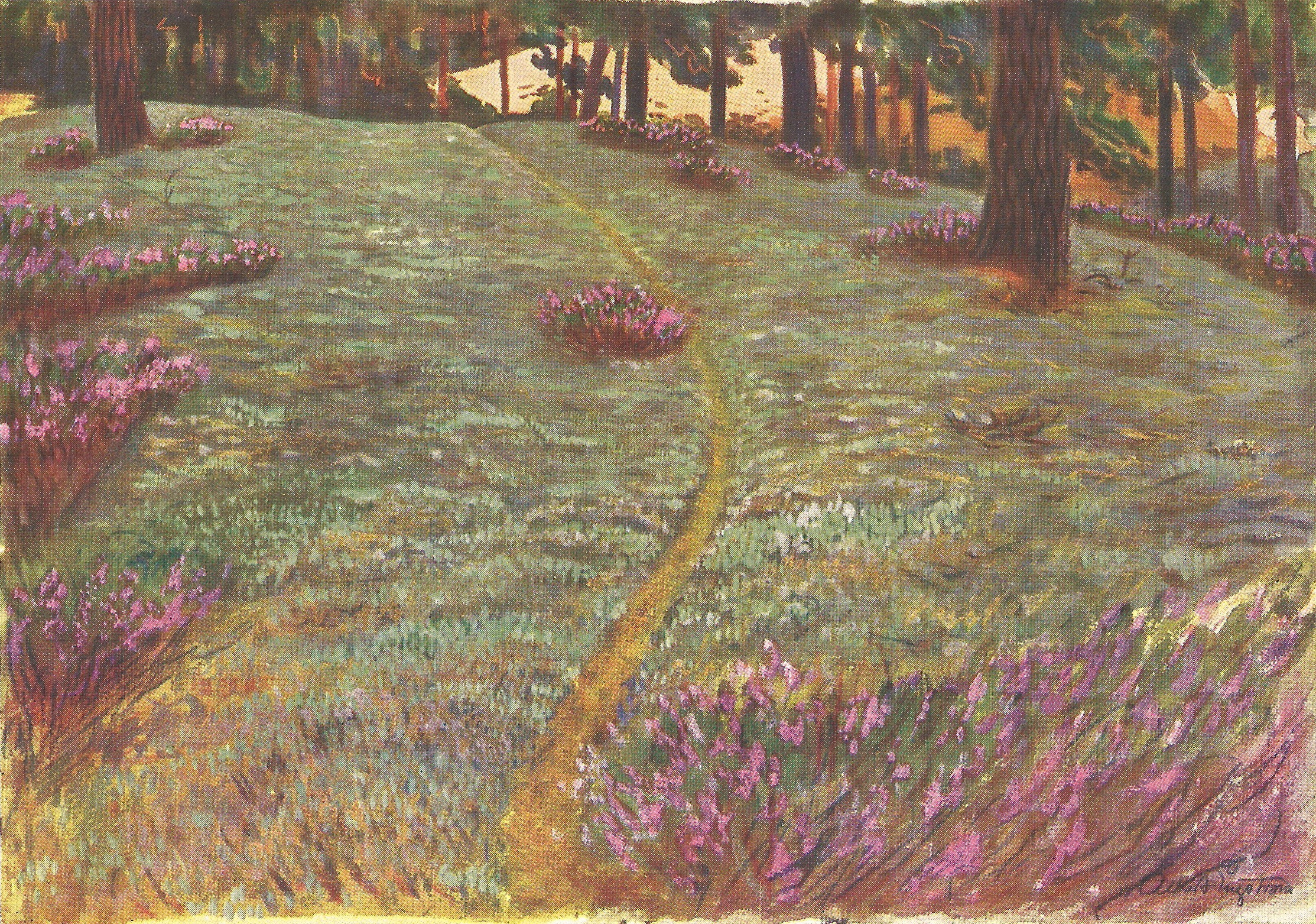 "En harstig"